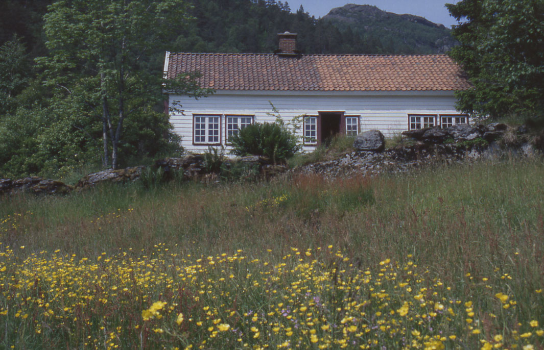 Jonegarden på Hustveit i Sauda er ei avdeling av Ryfylkemuseet.